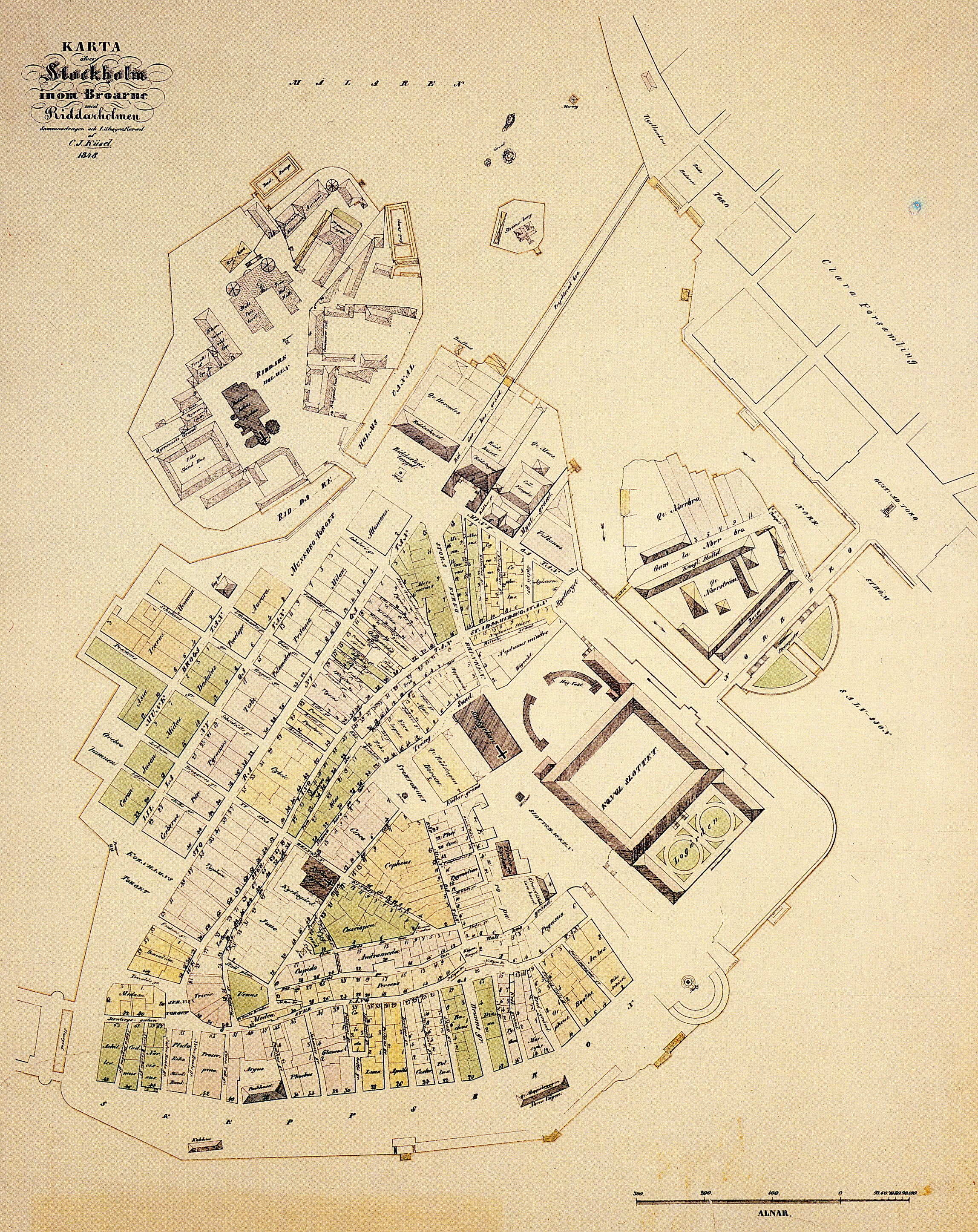 "Karta öfer Stockholm inom Broarne, Riddarholmen sammandragen och lithograferad af C.J. Küsel 1848"